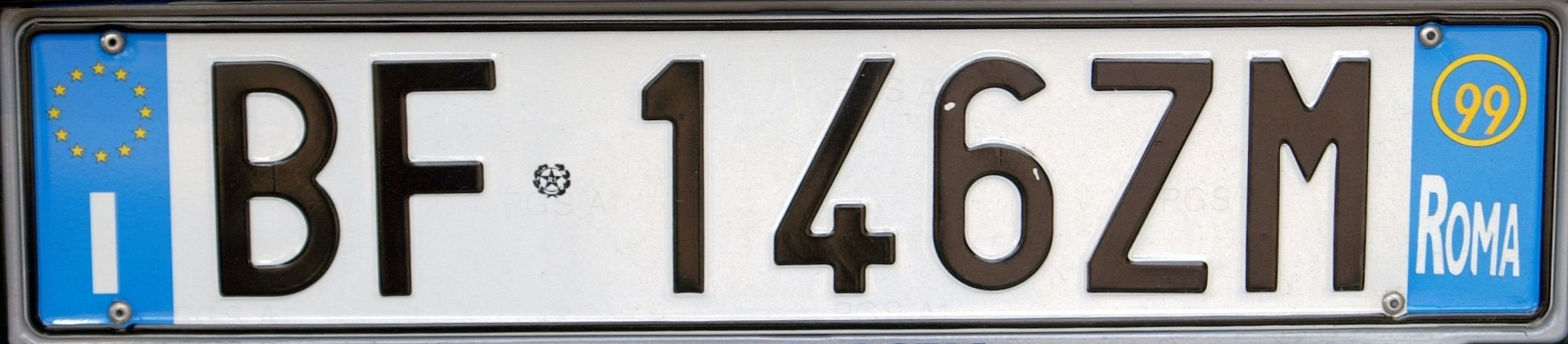 Italy licenseplate